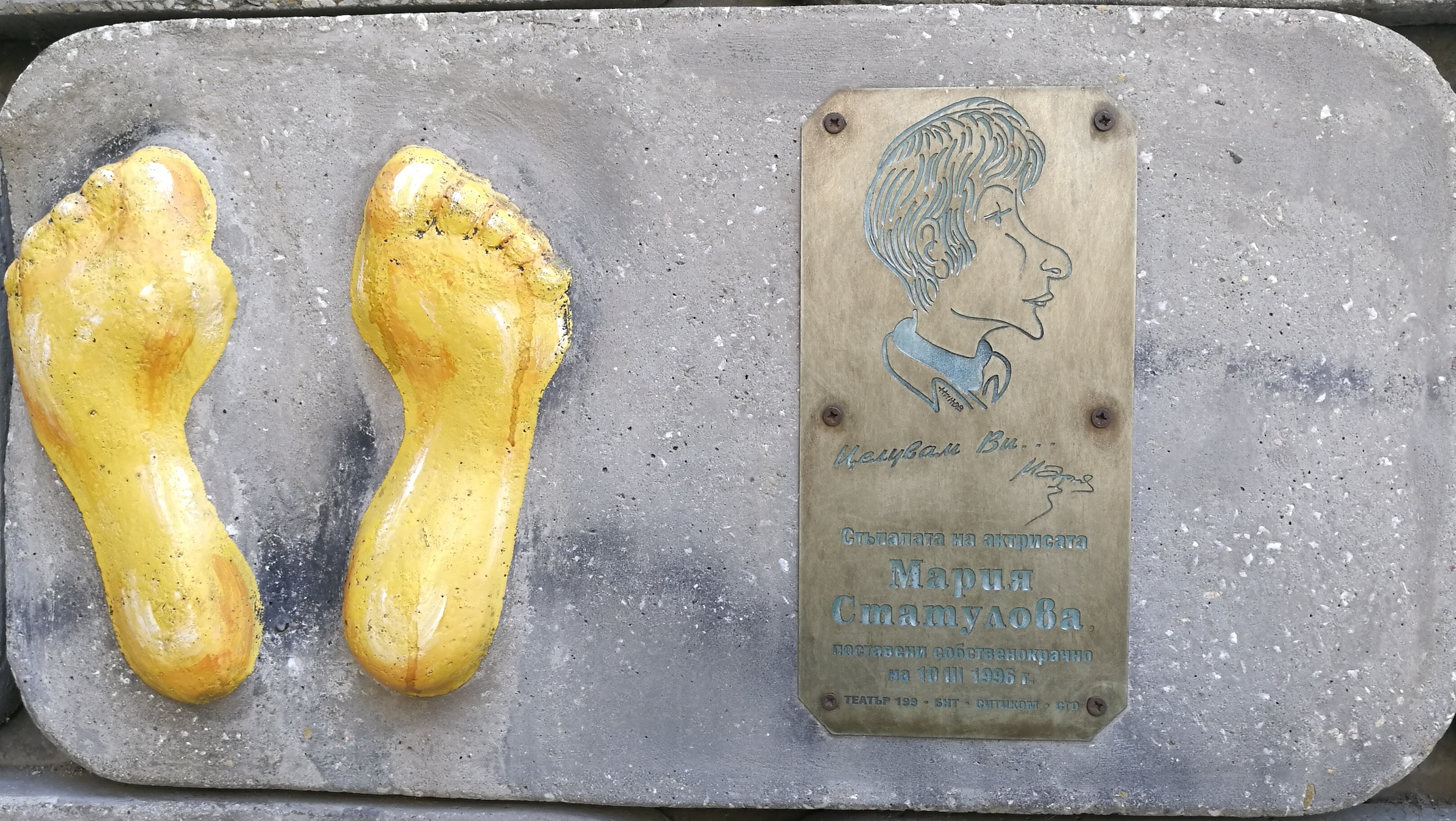 Стената на славата пред Театър 199 - пано с отпечатъци, послание и шарж на Мария Статулова.